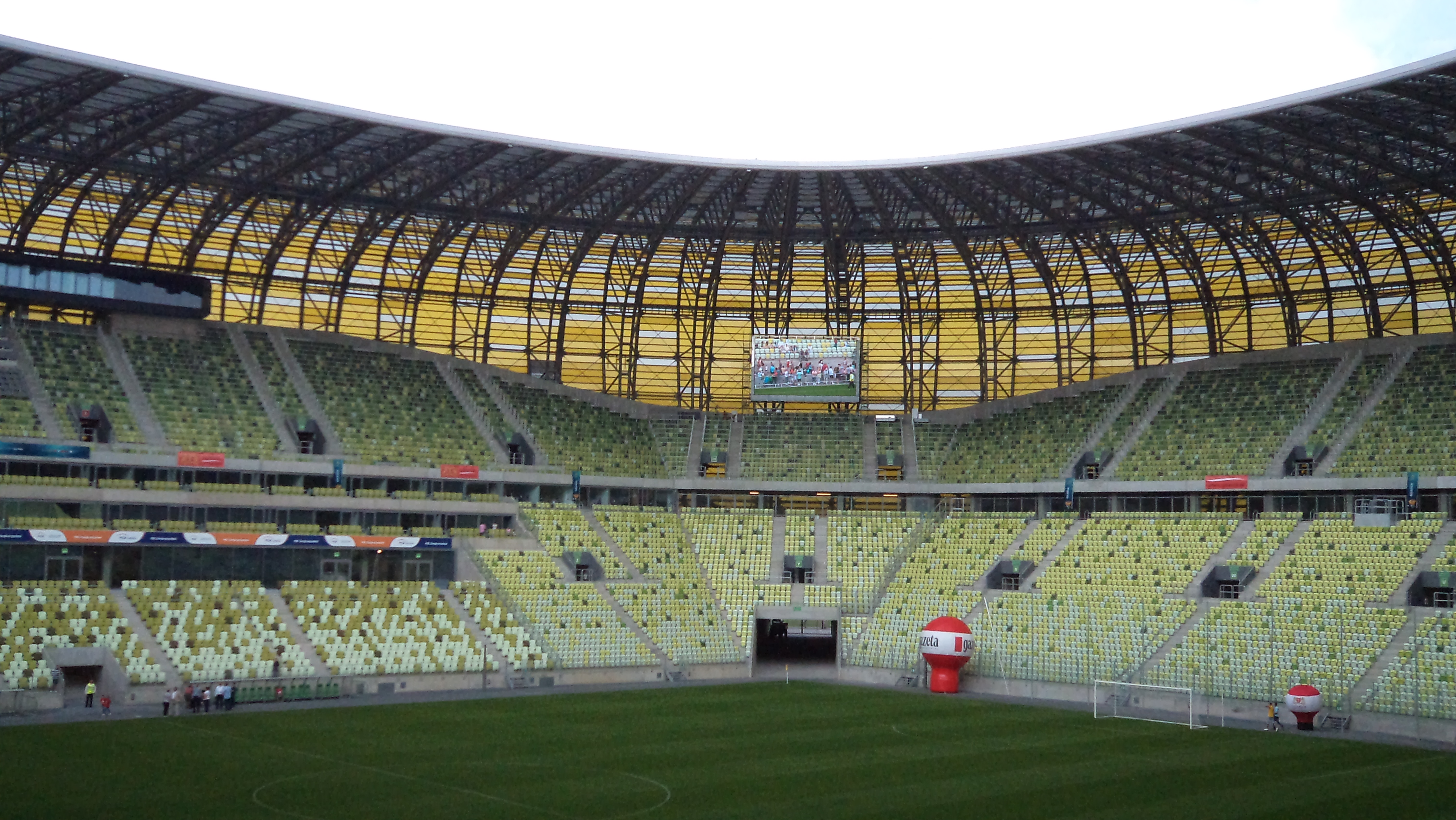 PGE arena 06.08.11